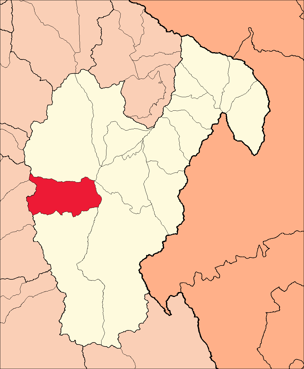 Área del distrito de Huántar dentro de la provincia de Huari.